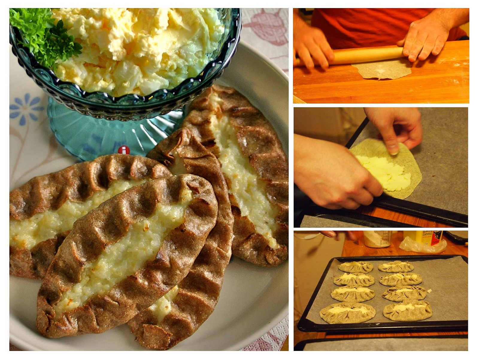 Kalitki - montaż